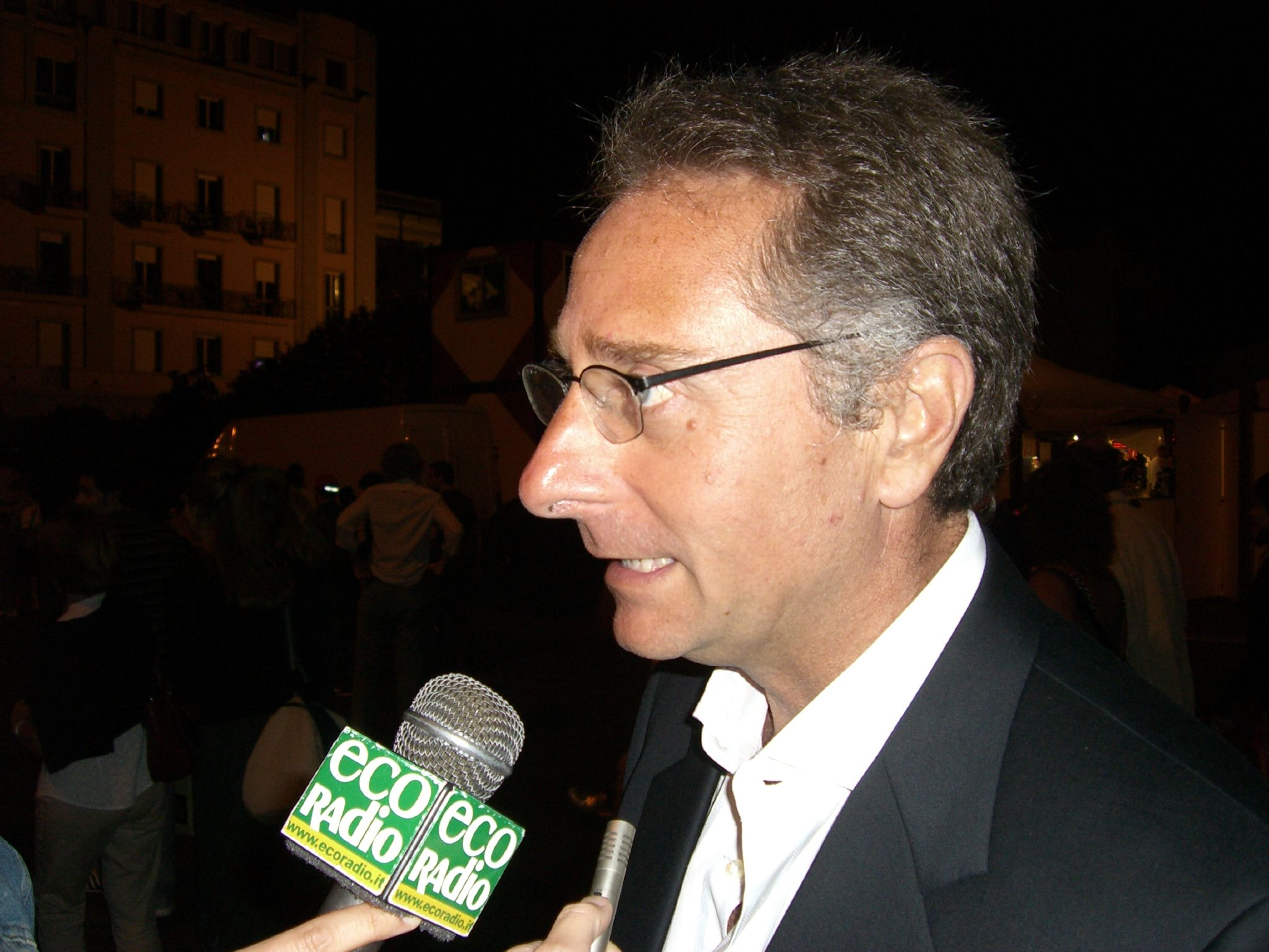 Il conduttore italiano Paolo Bonolis